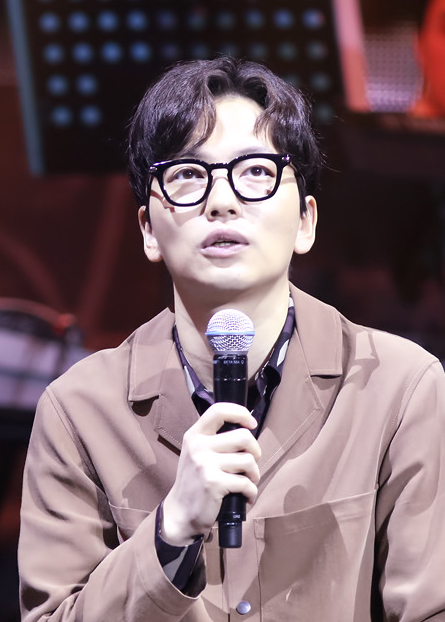 160305 응답하라 1988 콘서트 이동휘